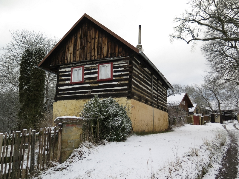 Venkovský dům - přestavěn ze sýpky (Olešno), Olešno 9, Olešno.